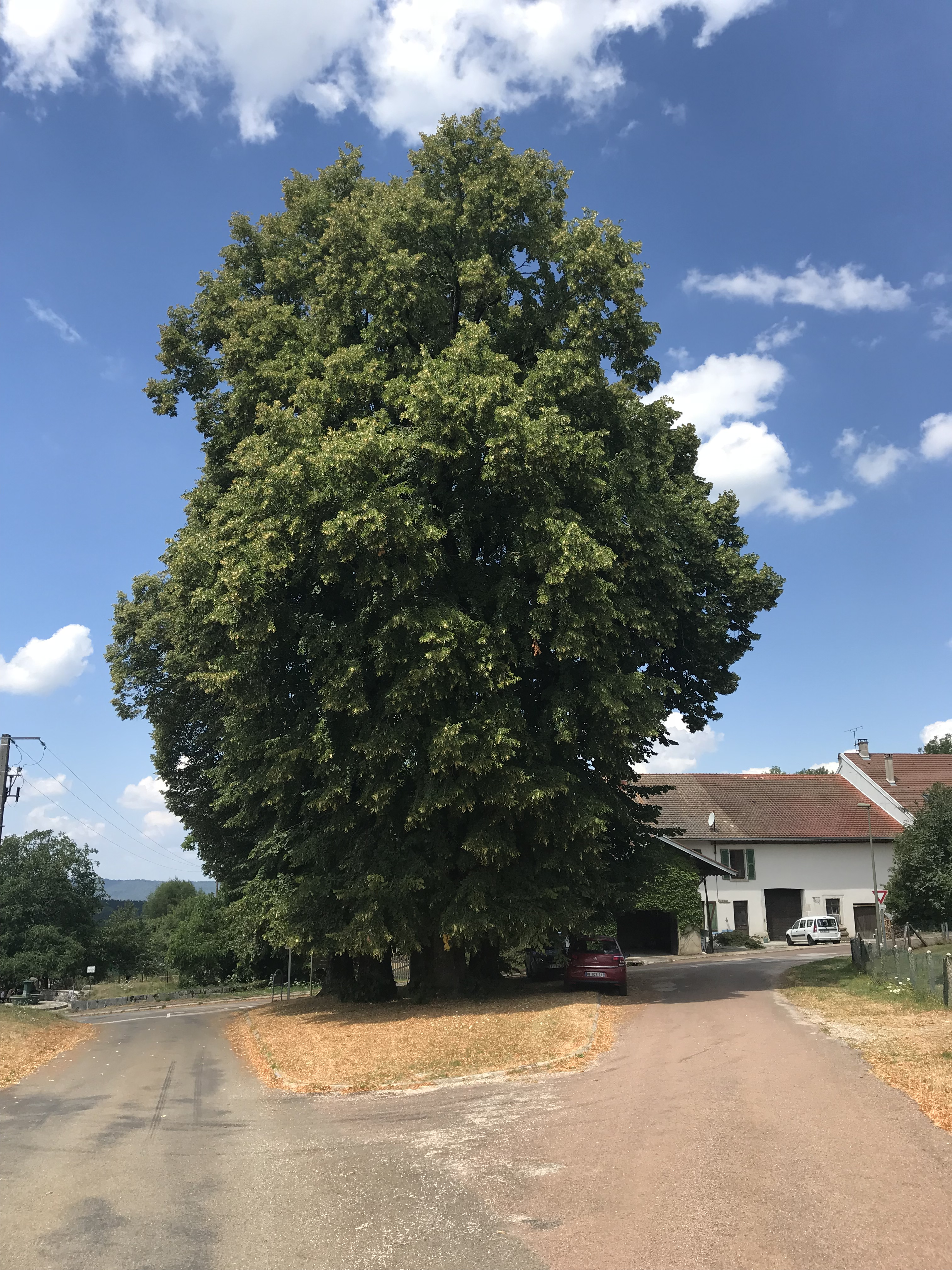 Village d'Hautecour (Jura) en juillet 2018.